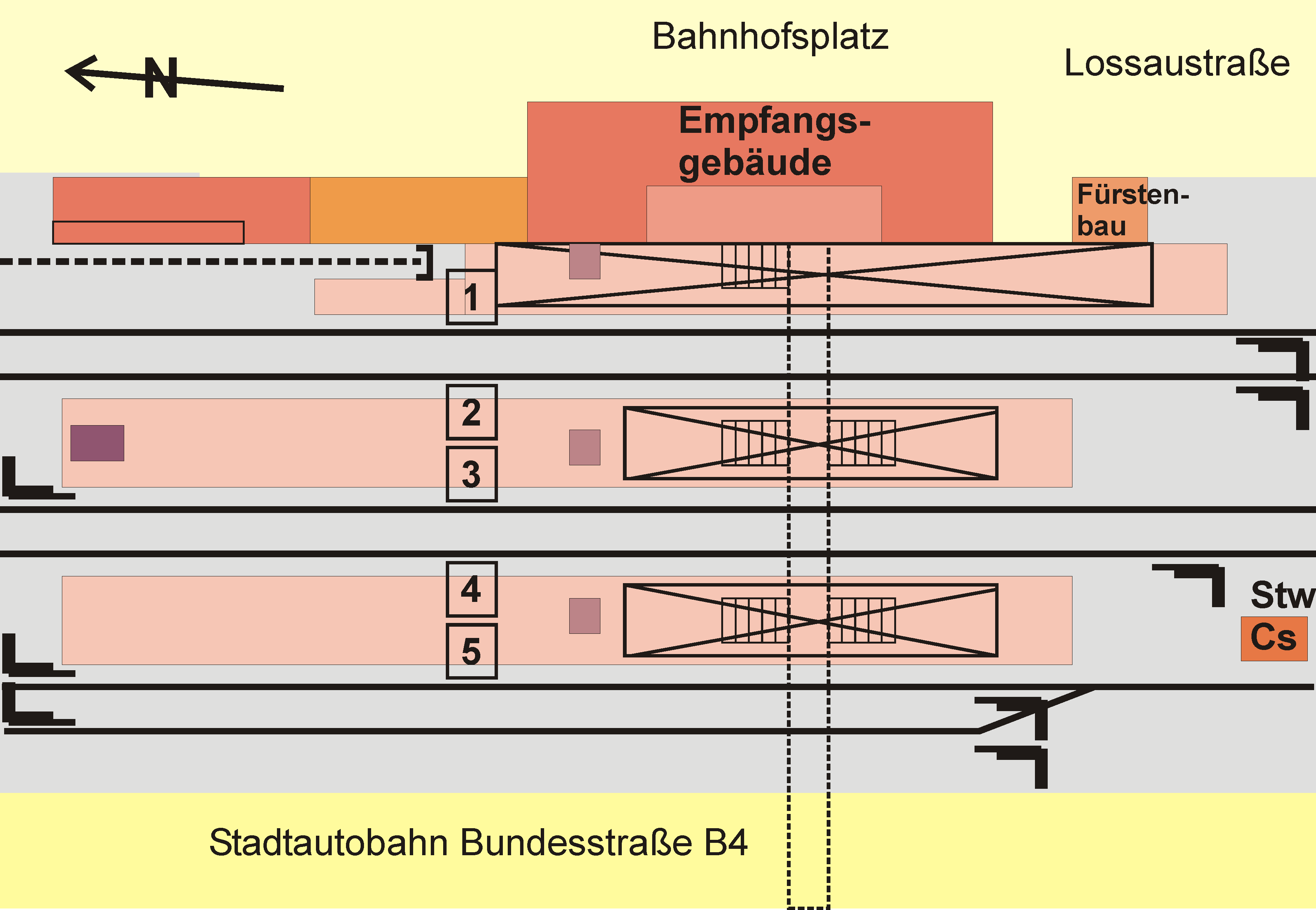 Personenbahnhof Coburg, Gleisplan